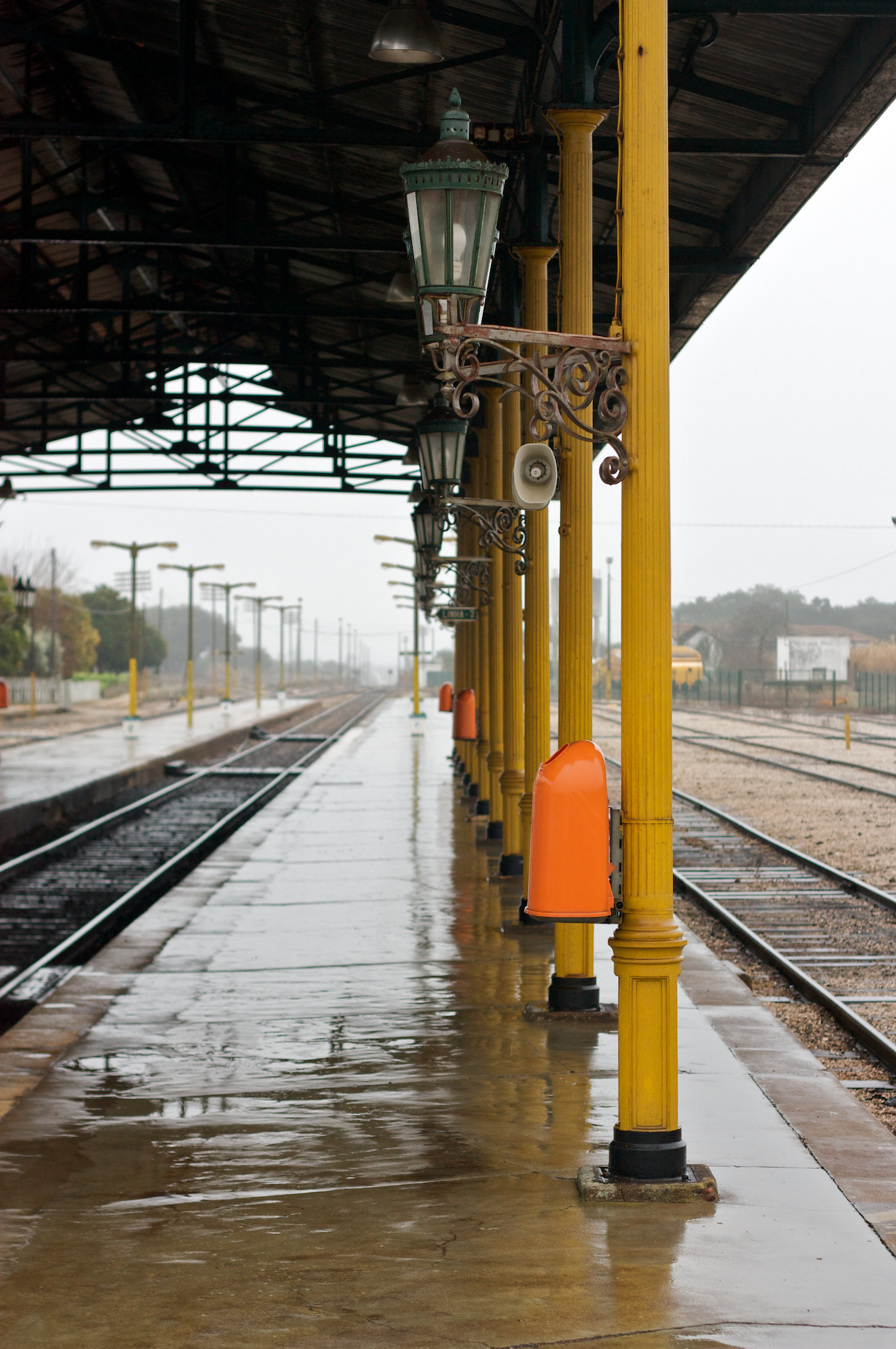 Tipo: E [Estação] Local: Casa Branca [Linha do Alentejo, PK 90 • Linha de Évora, PK 90] Data e hora: 22 de Janeiro de 2009 [16h48]